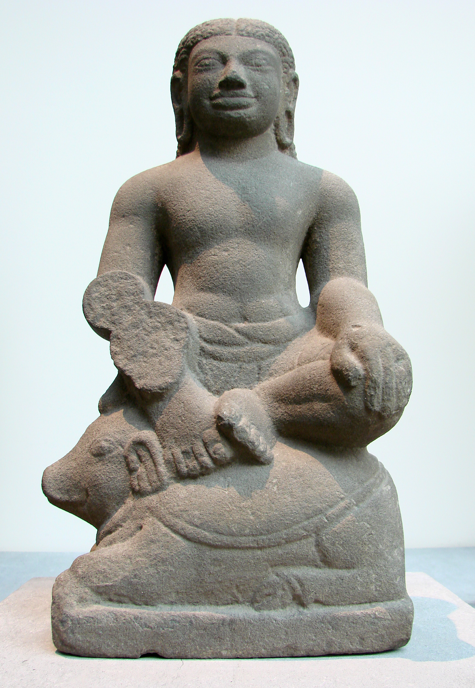 Statue représentant peut-être le dieu Agni. Cambodge, province de Takeo, Angkor Borei, 7ème siècle (?), grès. Musée Guimet, Paris.